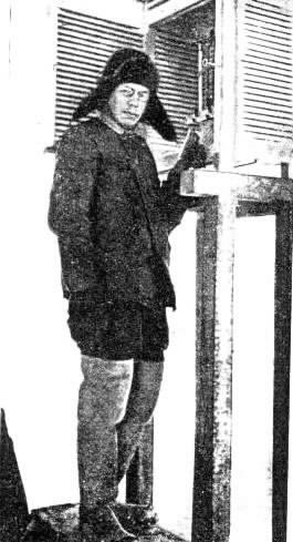 В.Ю.Визе в экспедиции на полюс Г.Я.Седова